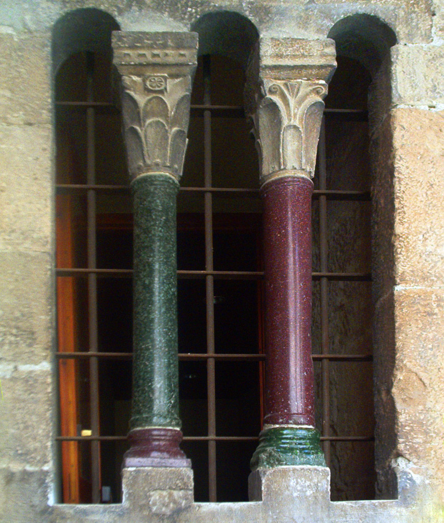 Al claustre de la catedral de Tortosa hi podem trobar aquesta curiosa finestra, del segle XIII, que presenta la curiosa particularitat de tenir dues columnes fetes de pedra de colors, una vermellosa i l'altre verda. Els seus basaments tenen els colors canviats.